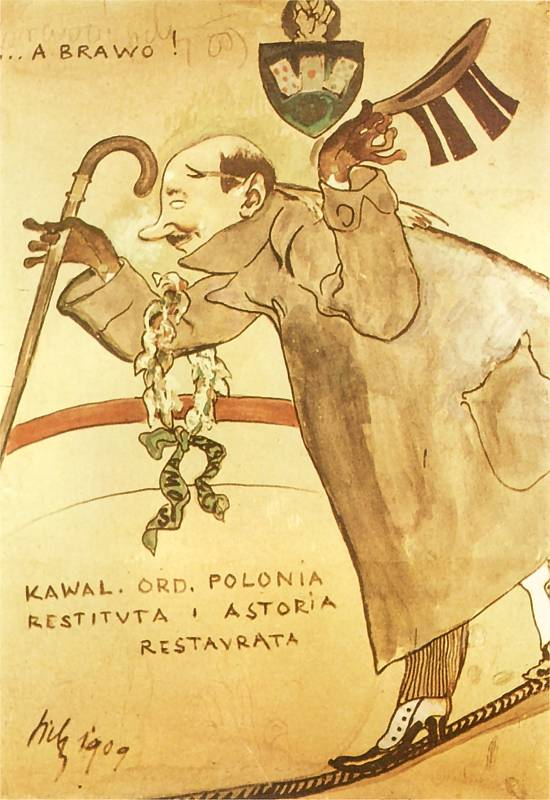 Karykatura Kornela Makuszyńskiego 1910. Akwarela, kredka, papier. 95 x 68,5 cm. Muzeum Tatrzańskie im. dra Tytusa Chałubińskiego w Zakopanem.